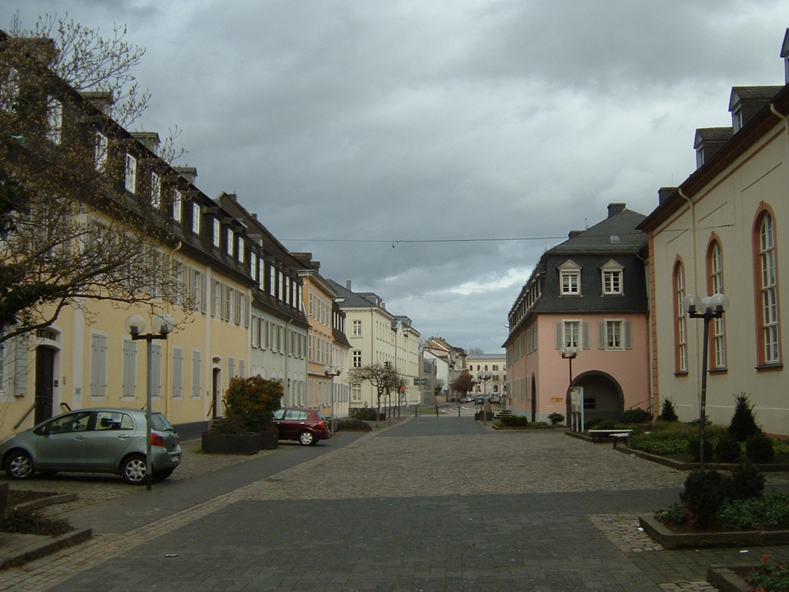 Herrenhuther Viertel Neuwied F.Lang Eig.Bild 25.02.07